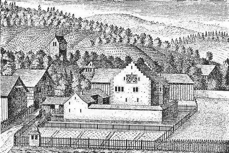 Schloss Knonau : Kupferstich in David Herrlibergers «Schlösser oder so genante ausere Vogteyen» 1740 (7. Stück); dazu auch Abriss der Geschichte und Namenliste der Gerichtsherren 1694-1140 (Dok.3).